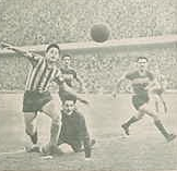 Imagen del partido disputado el 5 de agosto de 1945 entre Boca y Central.